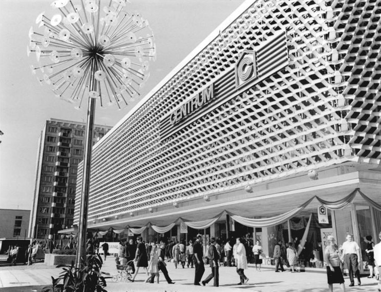 Suhl, "Centrum"-Warenhaus Zentralbild Demme 13.9.69 Suhl: Eröffnung des neuen Centrum-Warenhauses in Suhl. Drei Wochen vor dem geplanten Termin öffneten sich heute am 13.9.1969 die Türen des modernsten Centrum-Warenhauses der Republik in Suhl. Freundlich begrüßten die 520 Angestellten des Warenhauses in drei Verkaufsetagen des fünfstöckigen Gebäudes ihre ersten Kunden.